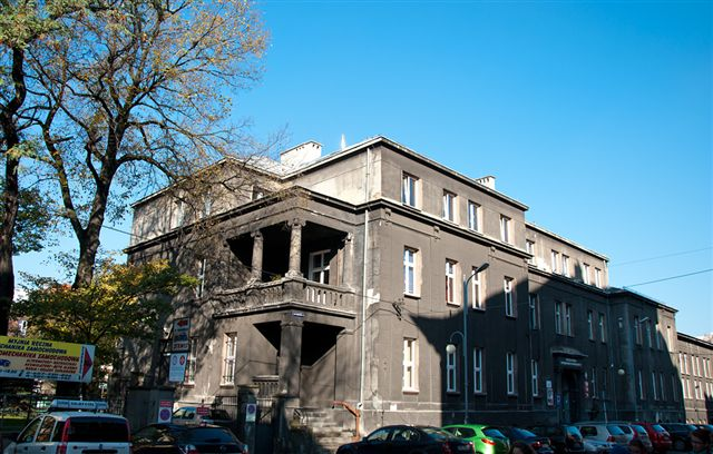 Budynek główny uczelni - Wyższej Szkoły Zarządzania Ochroną Pracy w Katowicach (WSZOP)